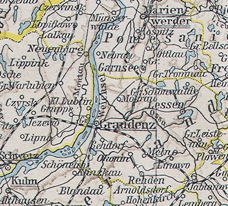 Kreis Graudenz, Ausschnitt aus